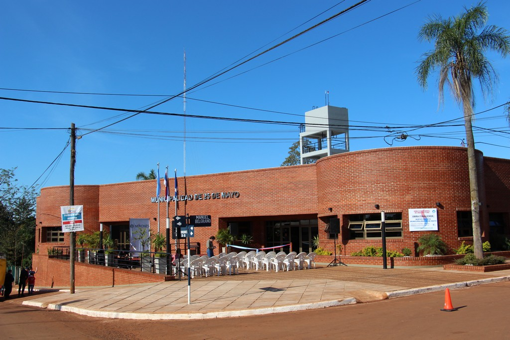 Municipalidad de 25 de Mayo, en la provincia de Misiones, Argentina.